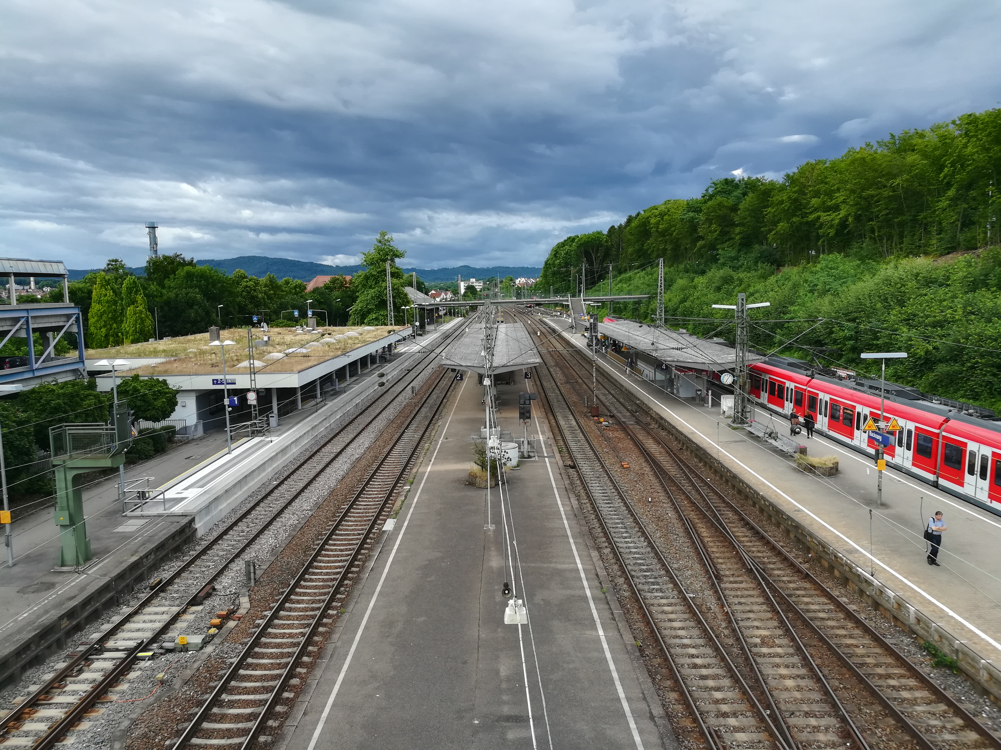 Der Bahnsteig und die Gleisanlagen am Backnanger Bahnhof